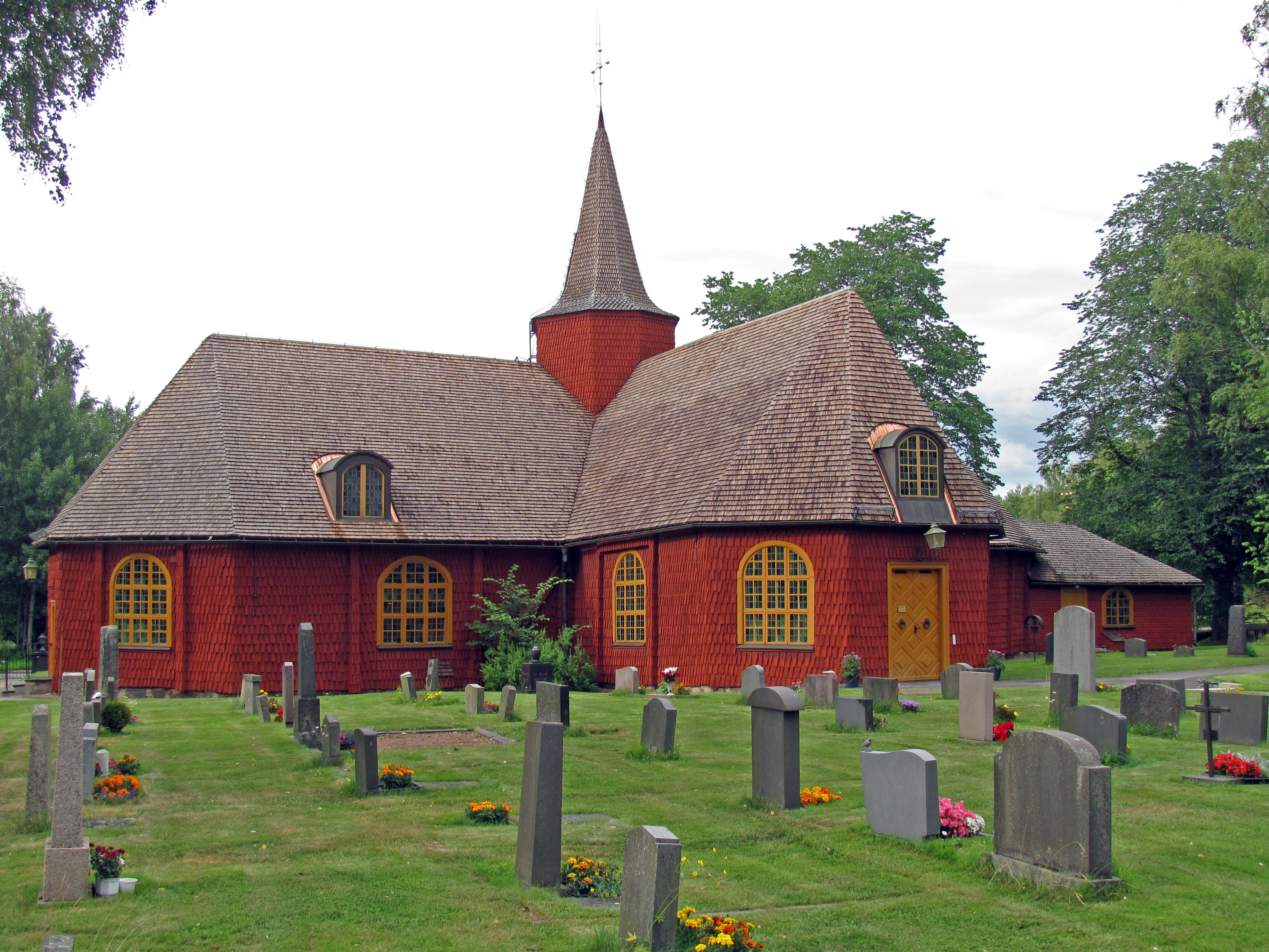 Hällefors kyrka